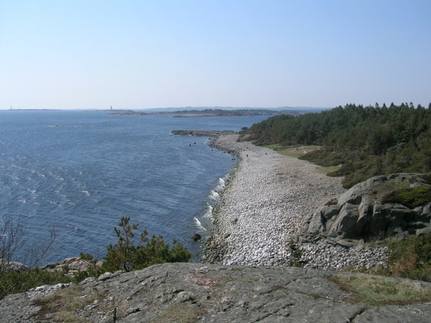 Hoveodden på Tromøy, Norway